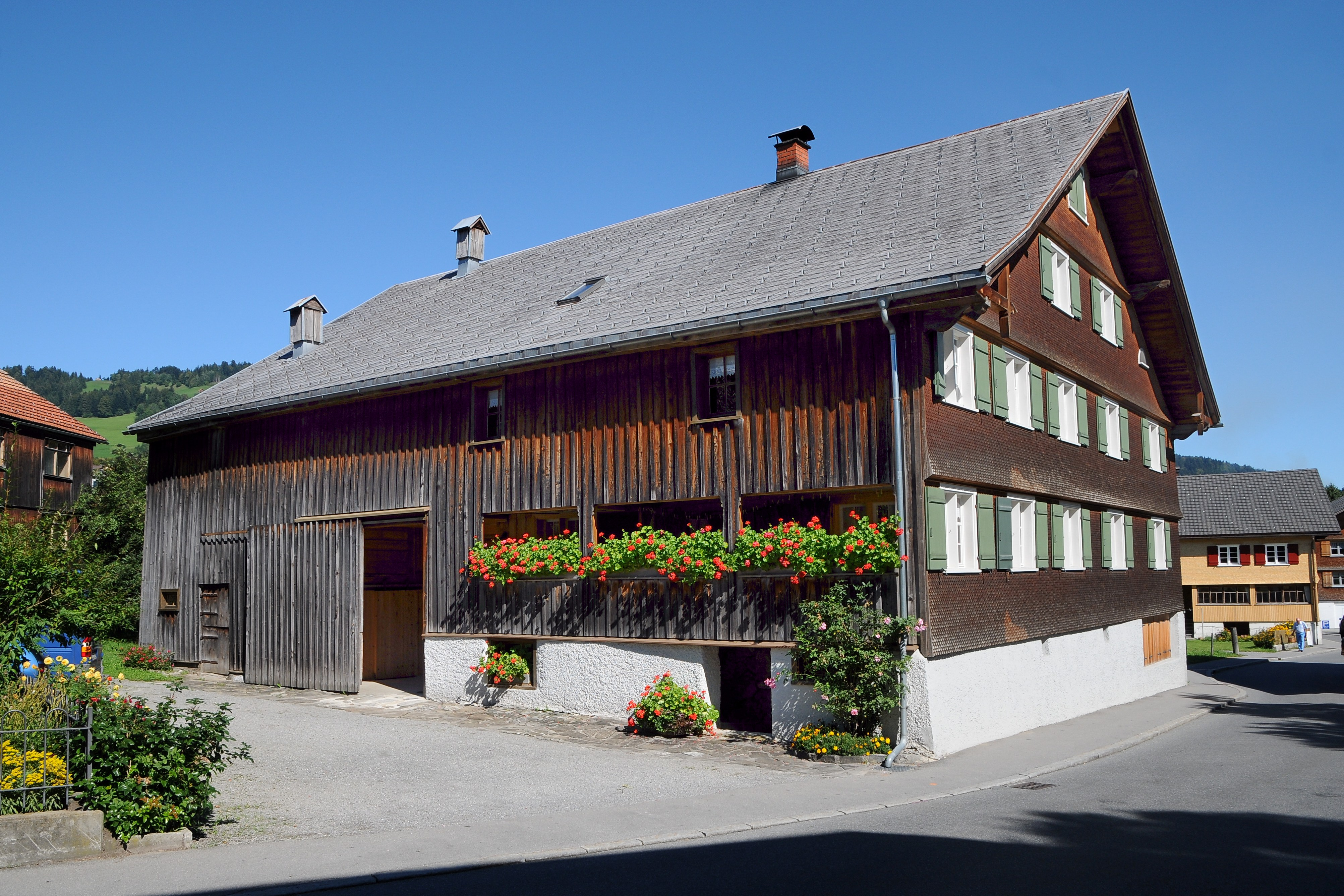 Hof Nr.27 in Schwarzenberg.